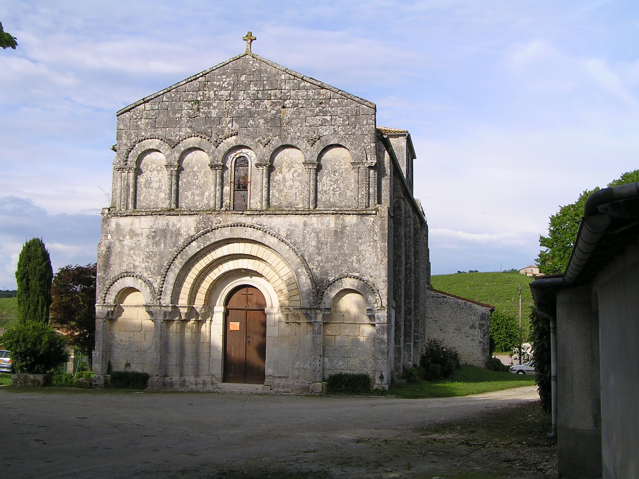 église de Touzac, Charente, France